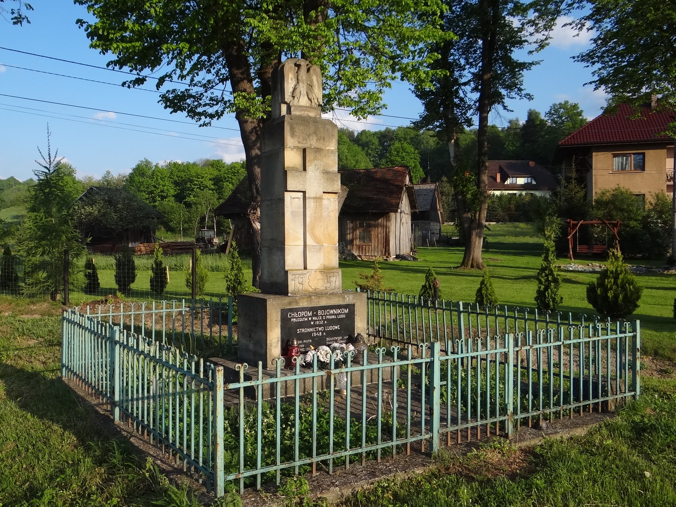 Pomnik poświęcony chłopom-bojownikom